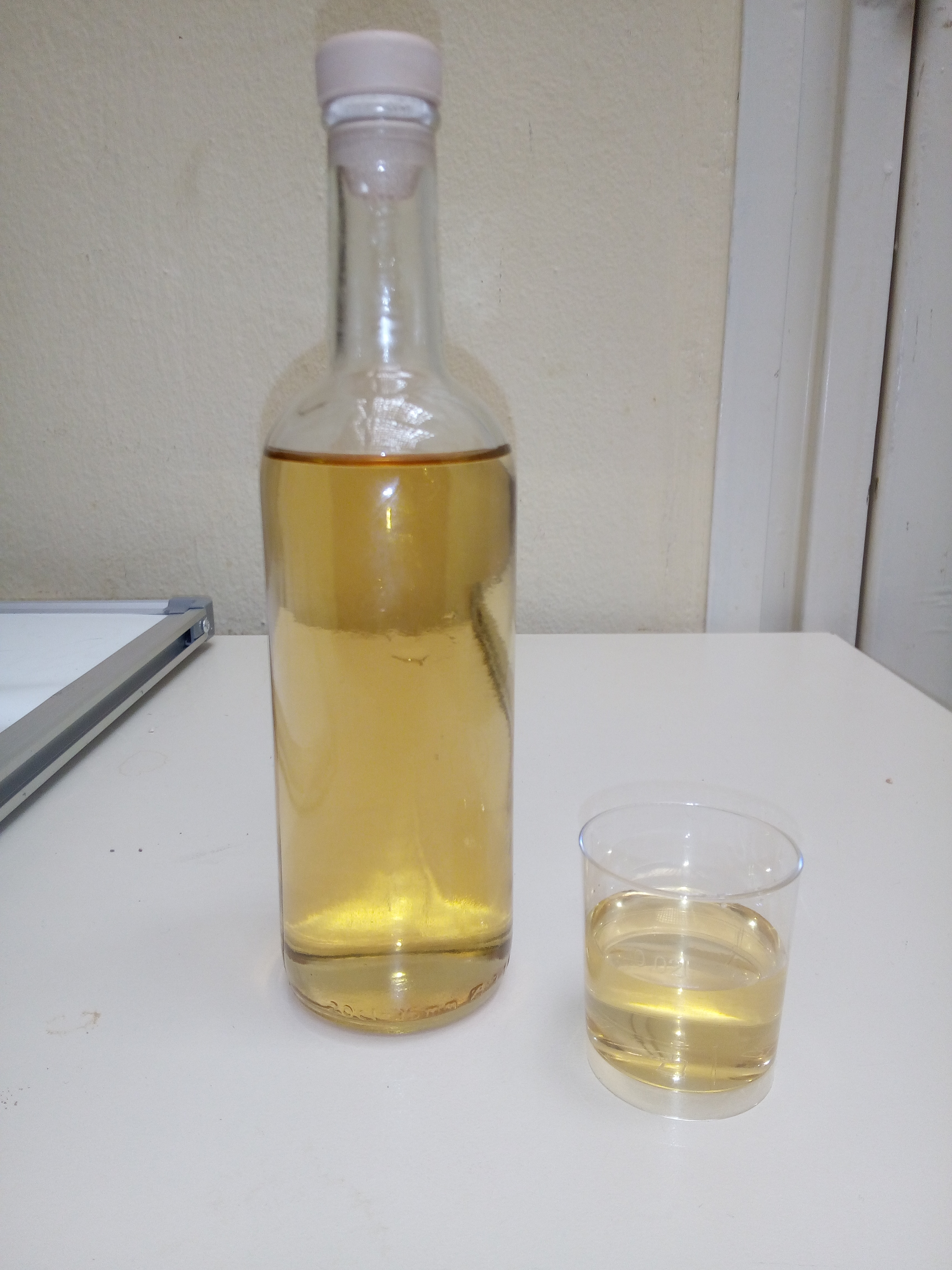 λικέρ αρμπαρόριζα